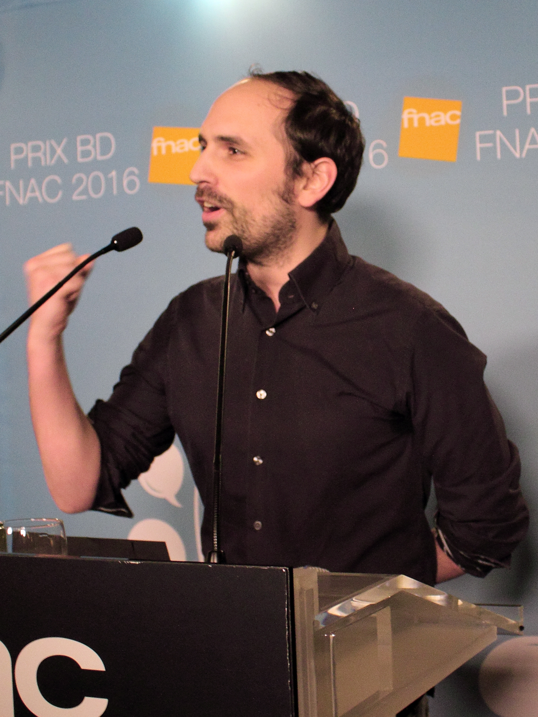 Benjamin Renner - Prix BD Fnac 2016